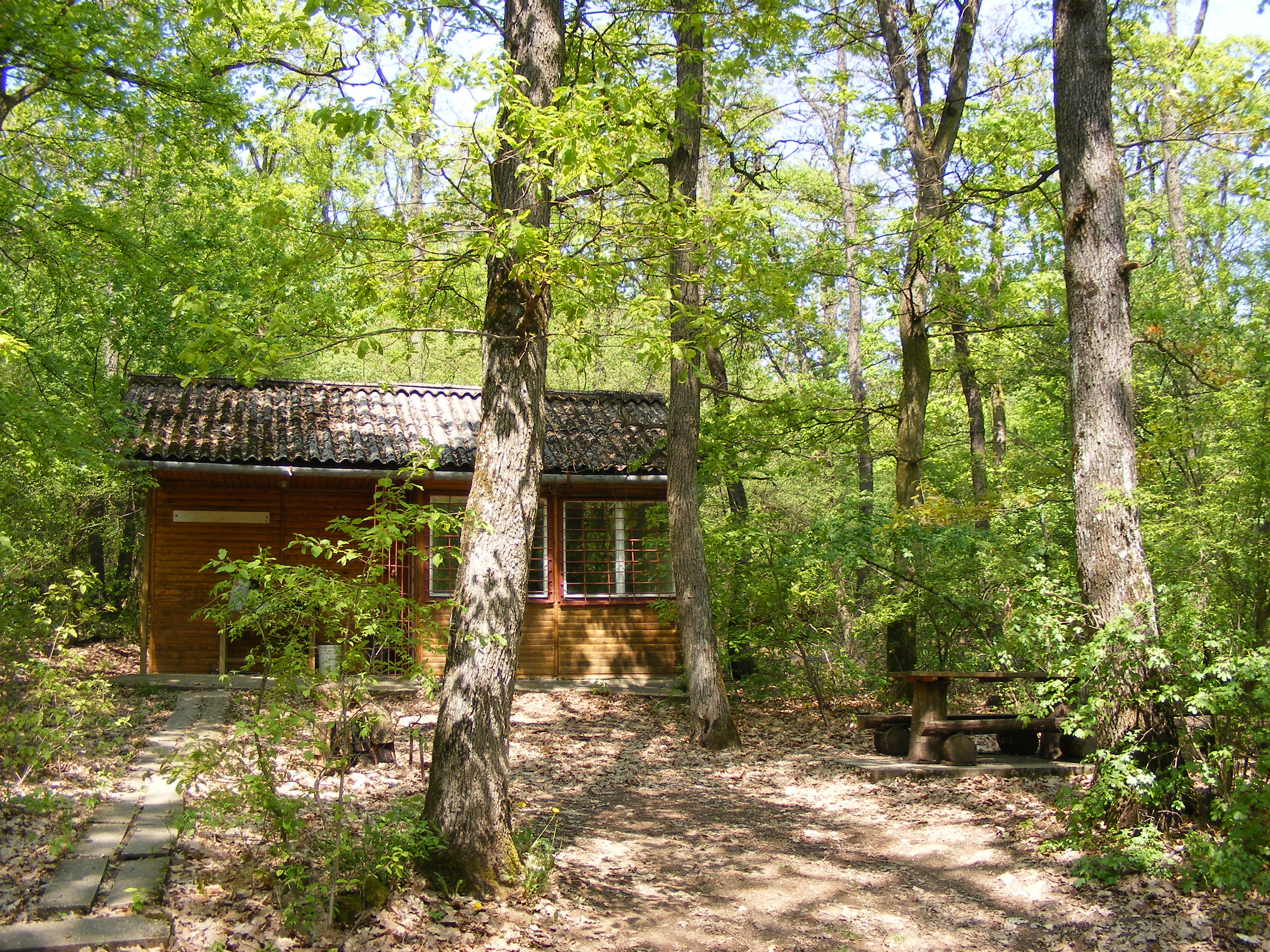 A területen megtalálható kis faház.